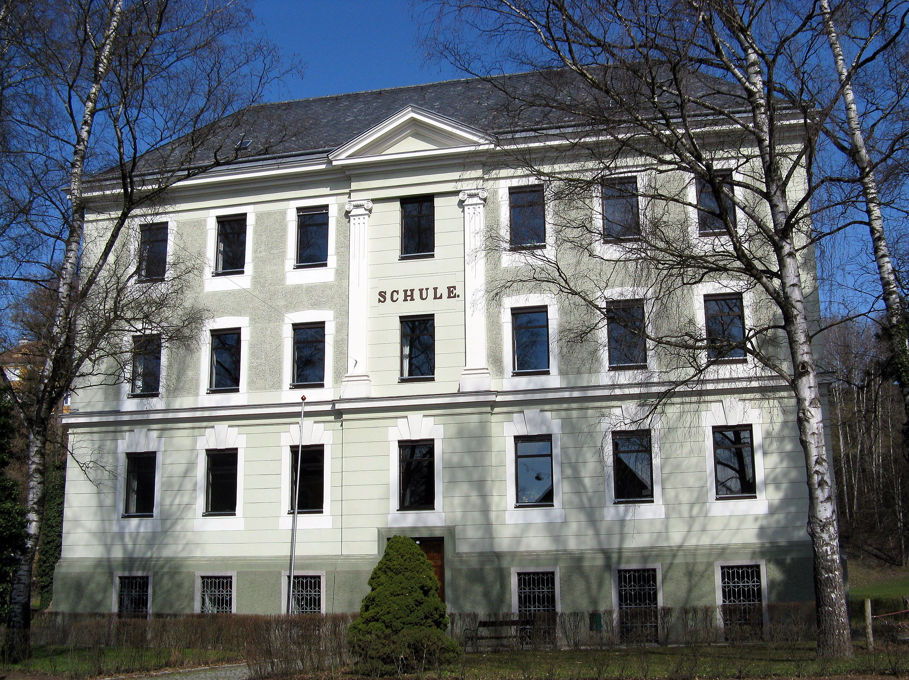 Alte Volksschule Perg aus 1892, saniert und als Nebengebäude der Hauptschule 1 in Verwendung. Steht als einziges noch als solches in Verwendung stehende Schulgebäude der Stadt Perg seit 2005 unter Denkmalschutz